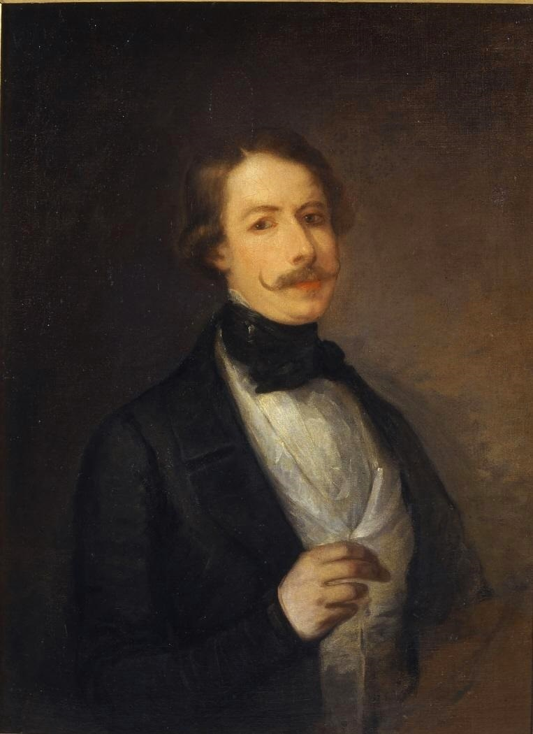 Retrato del escritor español José Gutiérrez de la Vega y Moncloa (1824-1900).